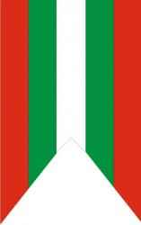 Flags of Kráľovský Chlmec